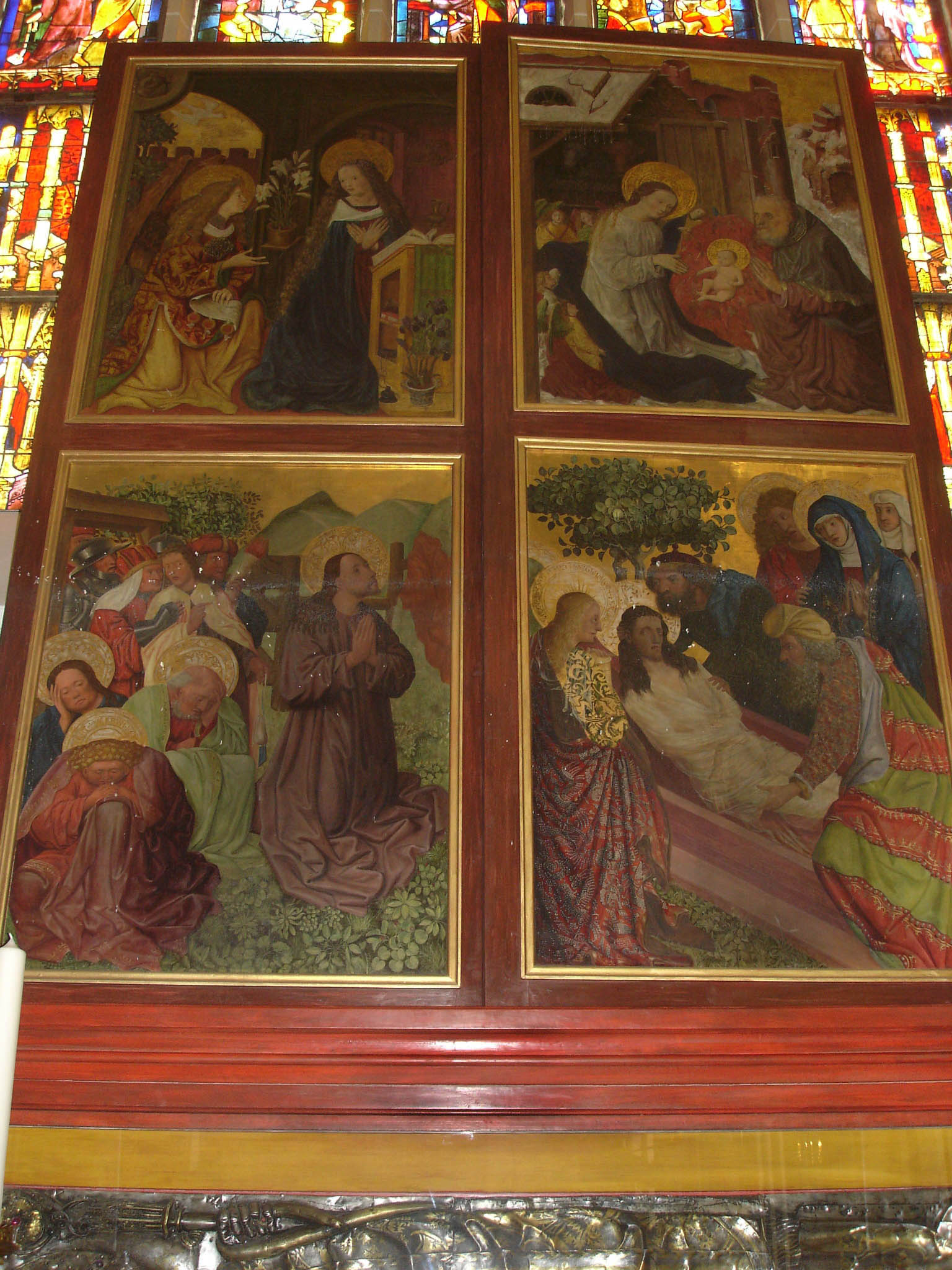 Domkreuzigungsaltar in geschlossenem Zustand